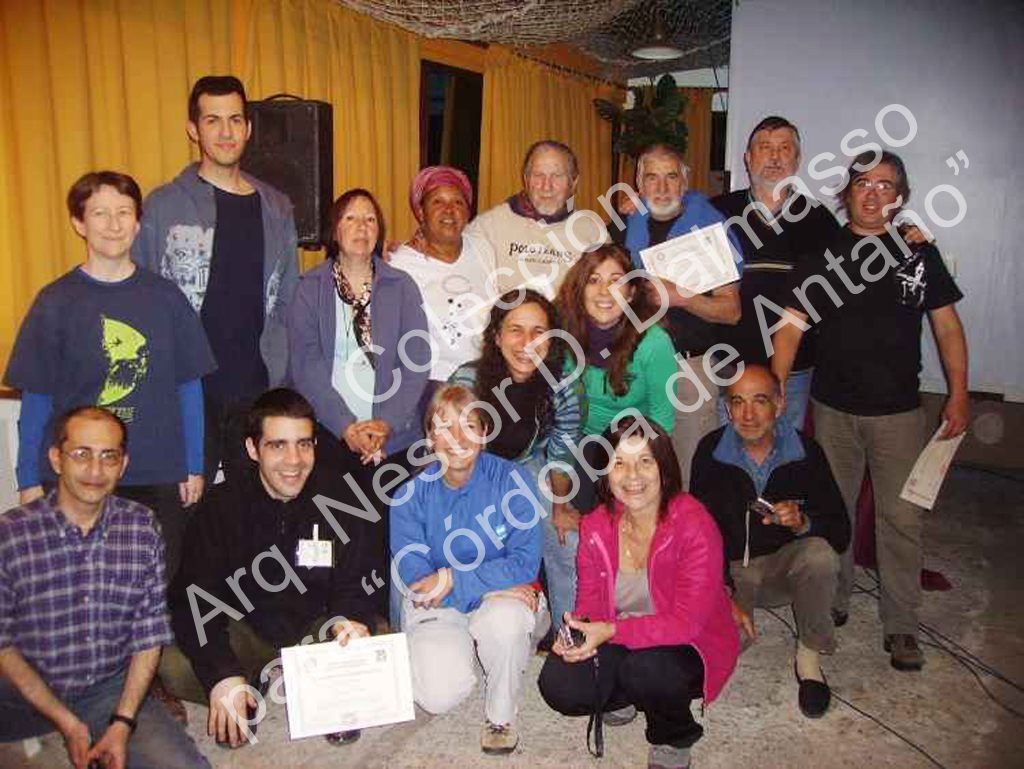 Livio Incatasciato 11 Eude-1P